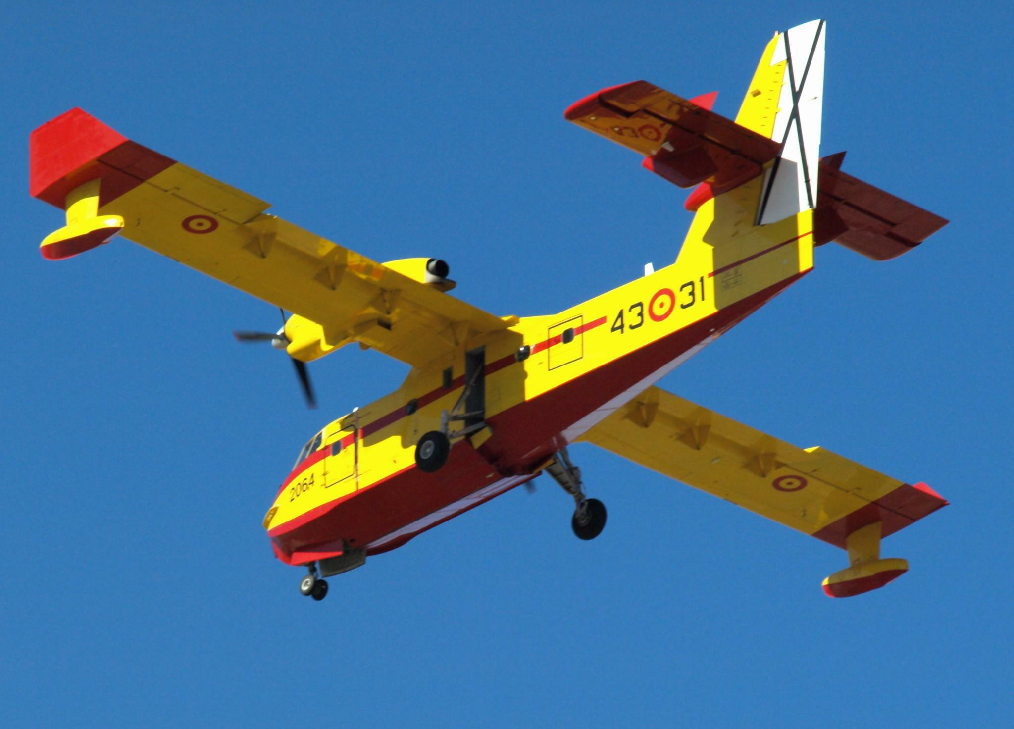 Dedicada al personal del grupo 43 que lucha todos los veranos contra la lacra de los incendios. Por cierto, los aviones están impecables, sobre todo si se comparan con los F-18